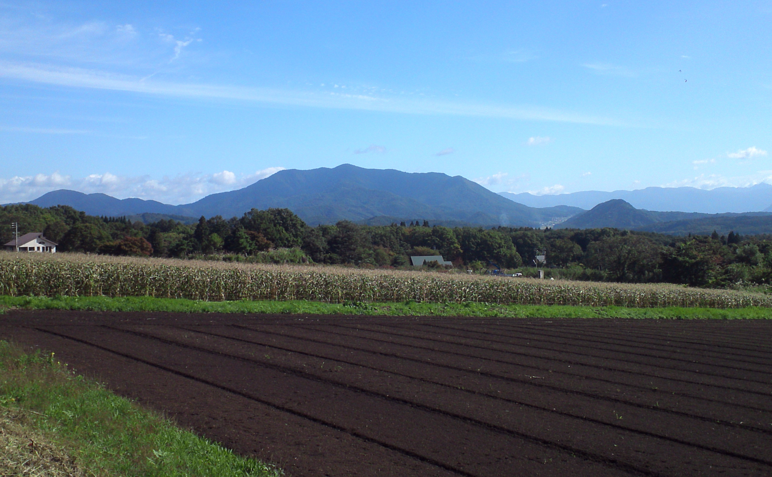 信濃町富が原から見た斑尾山